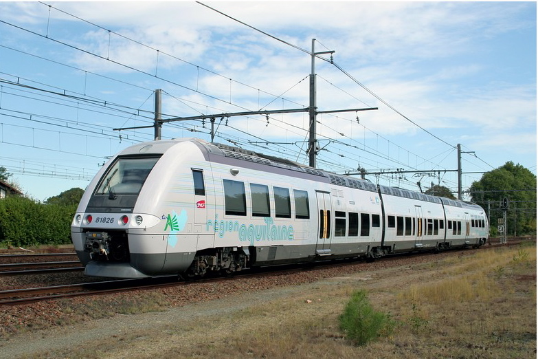 Photo d'un train sur le réseau TER Aquitaine avec la nouvelle livrée (2009)